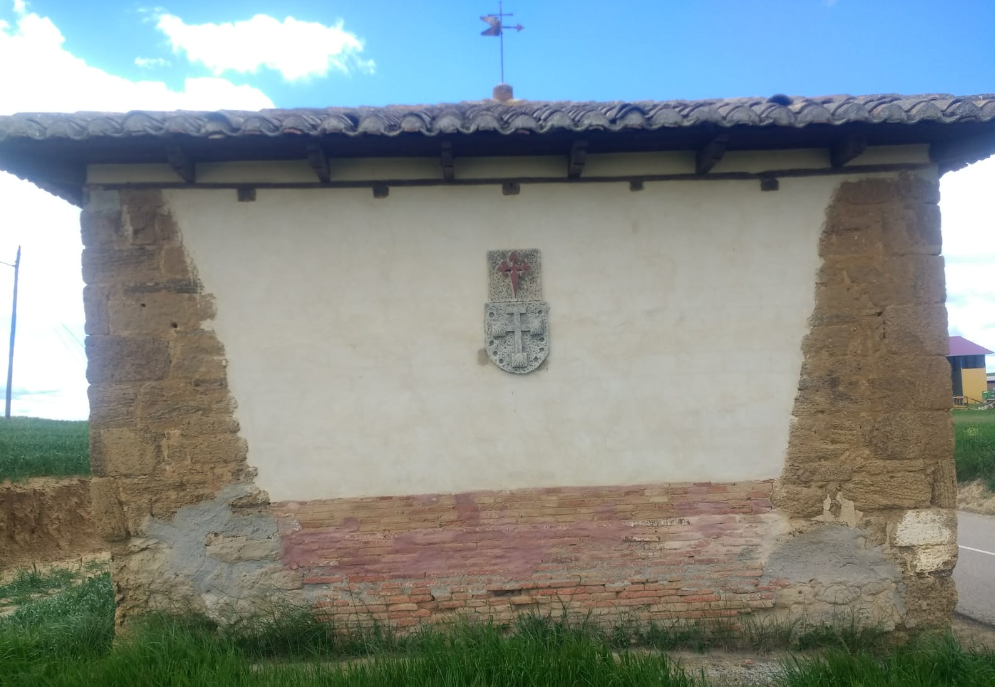 El Humilladero. Villalcazar de Sirga